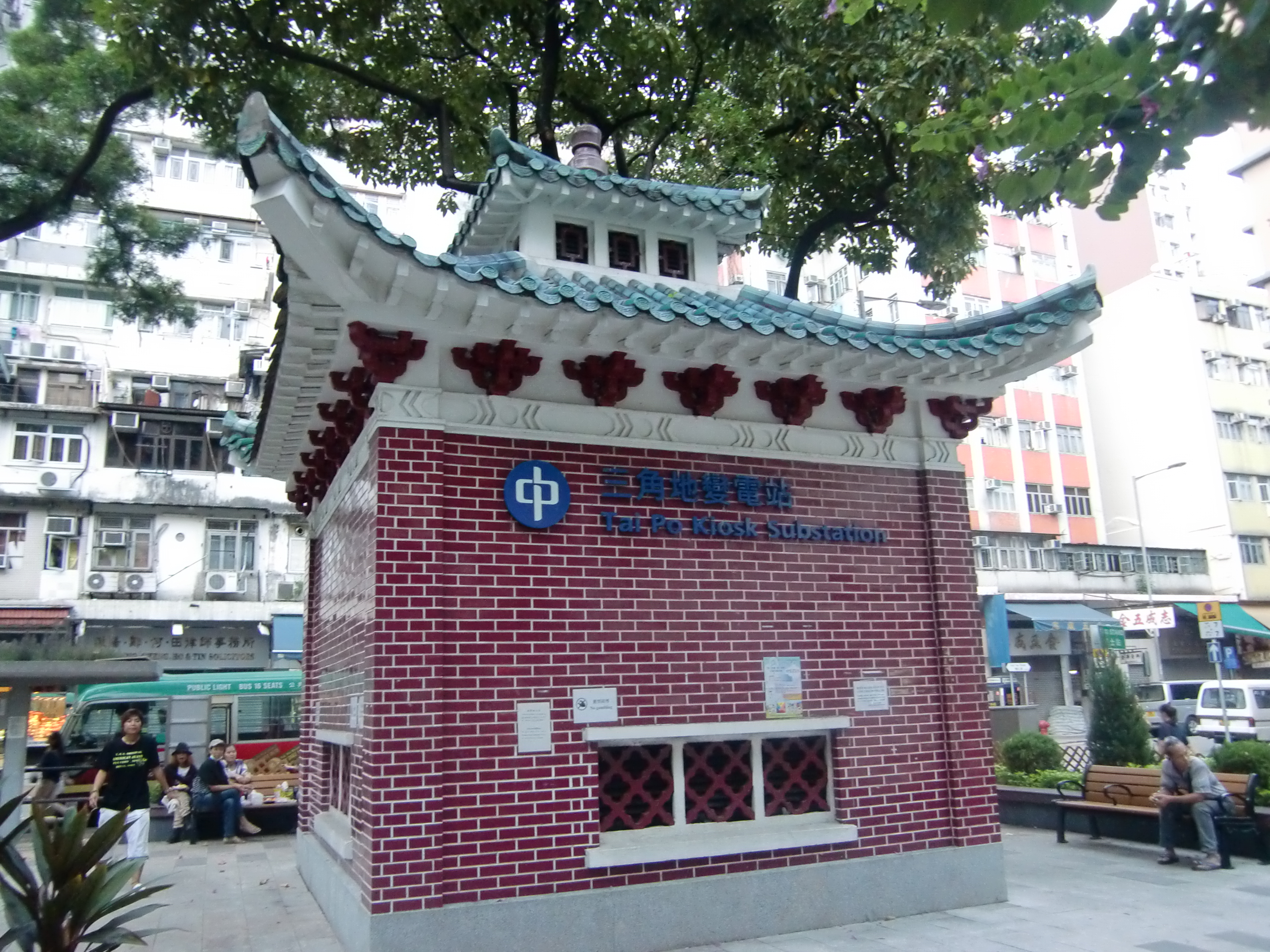 粵語: 三角地變電站，見於香港大埔。